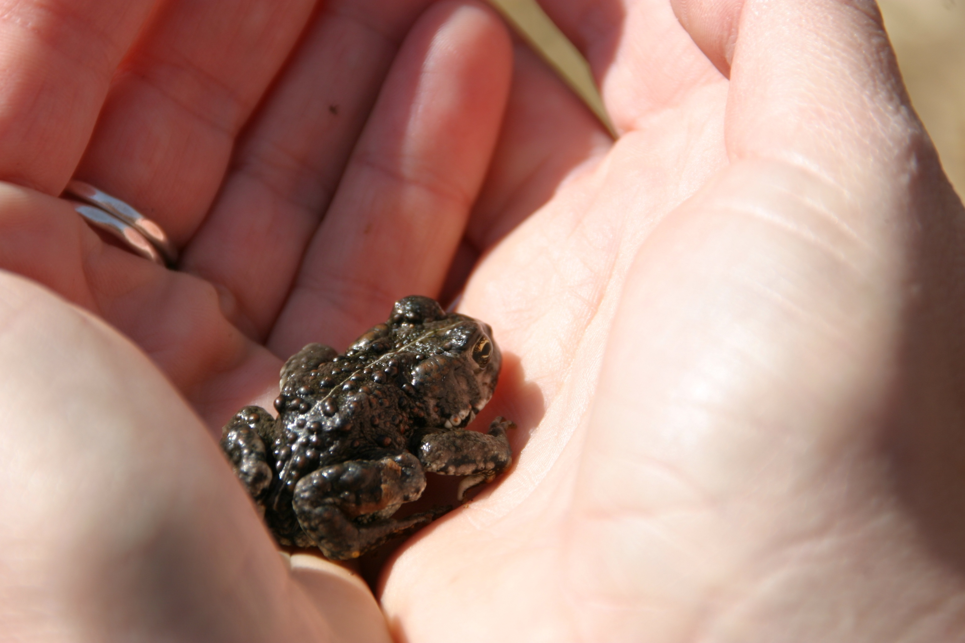 Amargosa toad (Anaxyrus nelsoni)